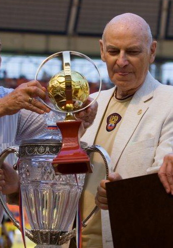 Valentin Bubukin